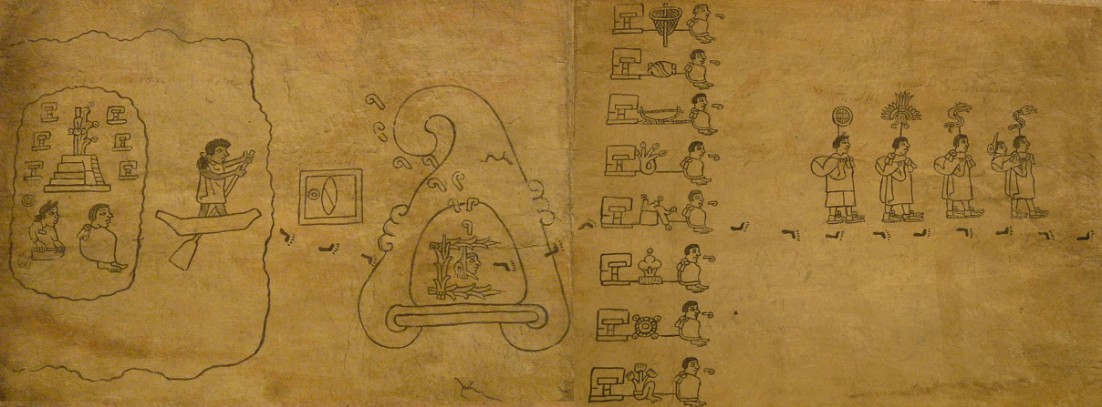 Migración desde Aztlán, pasando por el Chicomoztoc de dónde salen os Siete Pueblos Nahuatlacas - Tira de la Peregrinación